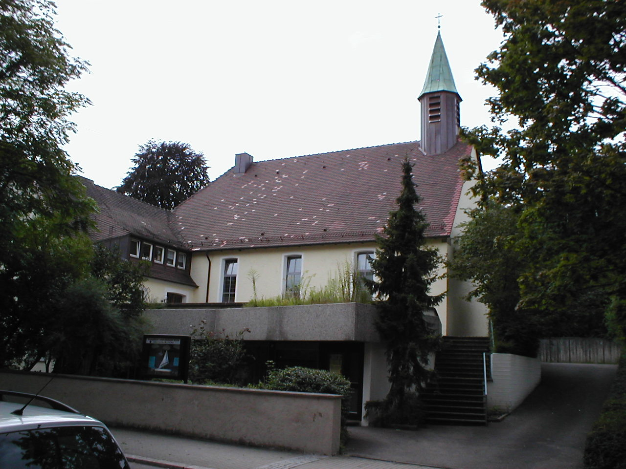 Evang.-method. Christuskirche in Heilbronn-Böckingen